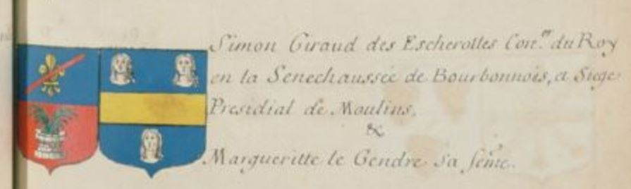 Armes des Giraud des Echerolles dans le Grand Armorial de France, Tome IV Bourbonnais